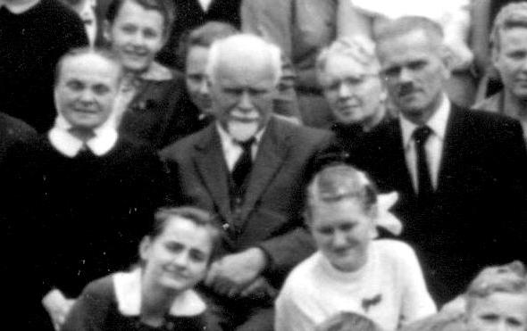 Danuta Gerke, bishop Karol Kotula and bishop Andrzej Wantuła